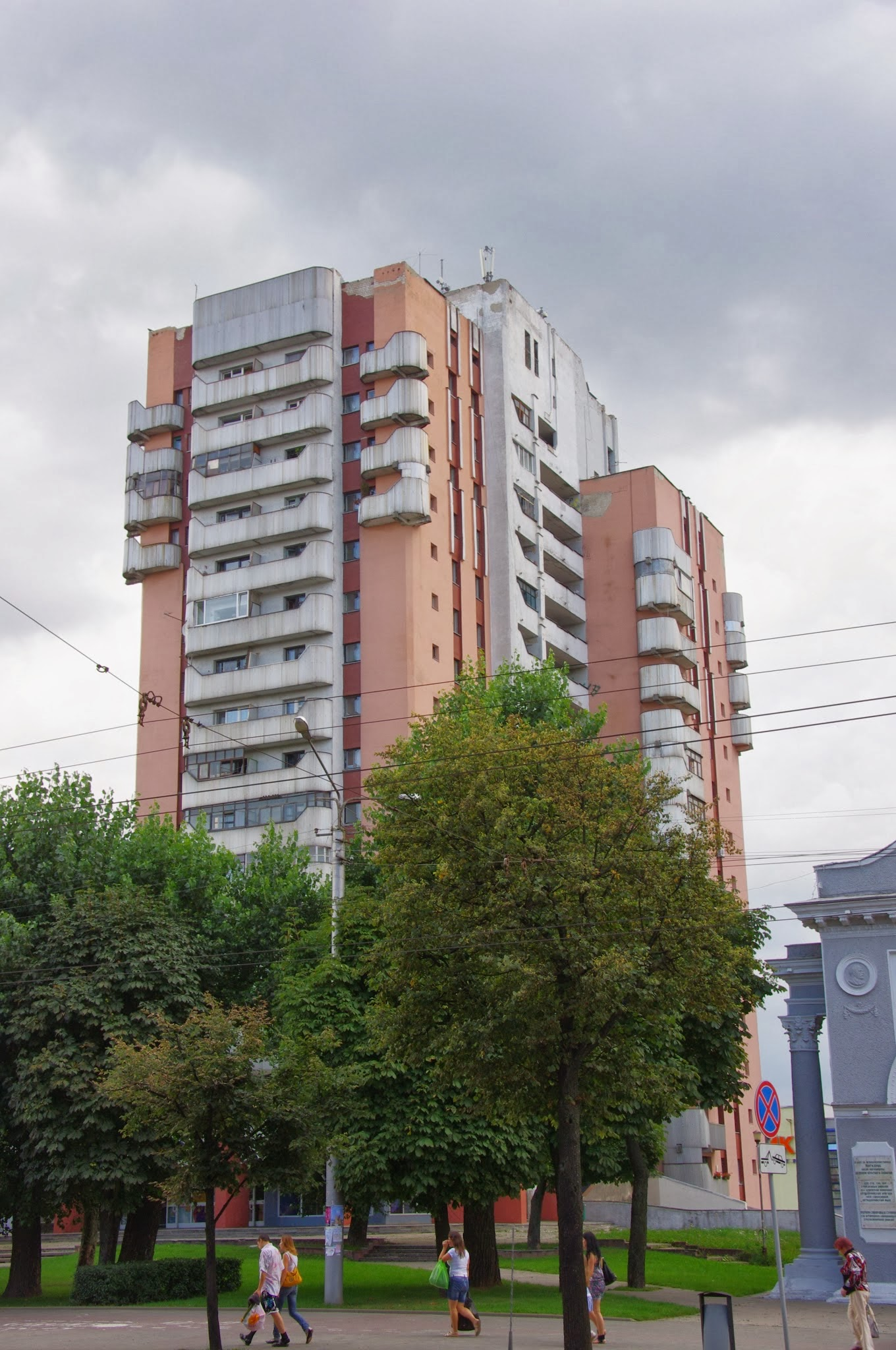 Lieninski District, Mogilev, Belarus